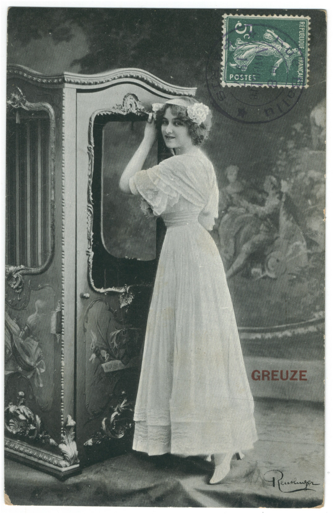 GREUZE, Lilian. Lorraine. Photo Reutlinger.